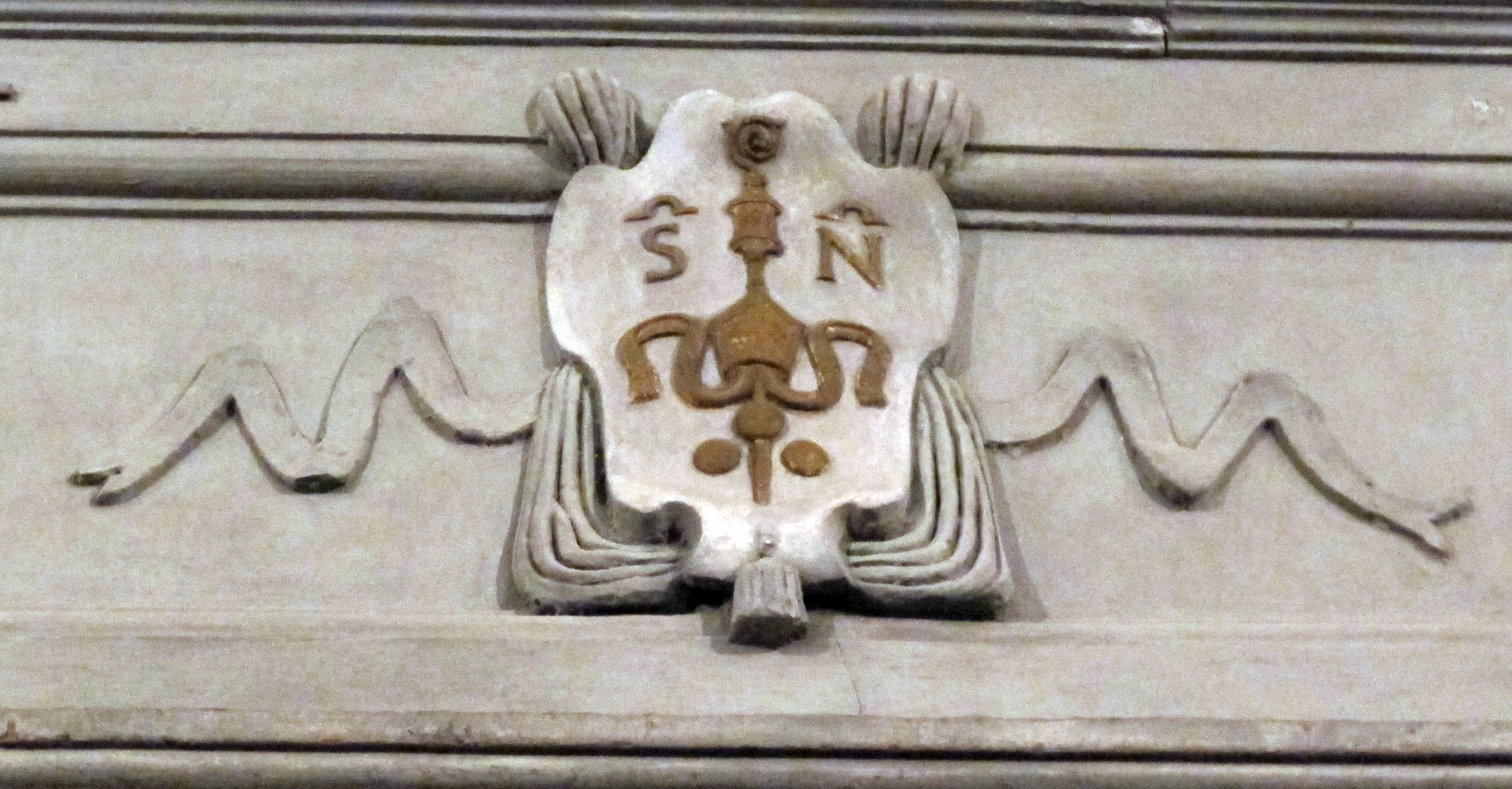 San Niccolò del Ceppo (Firenze)